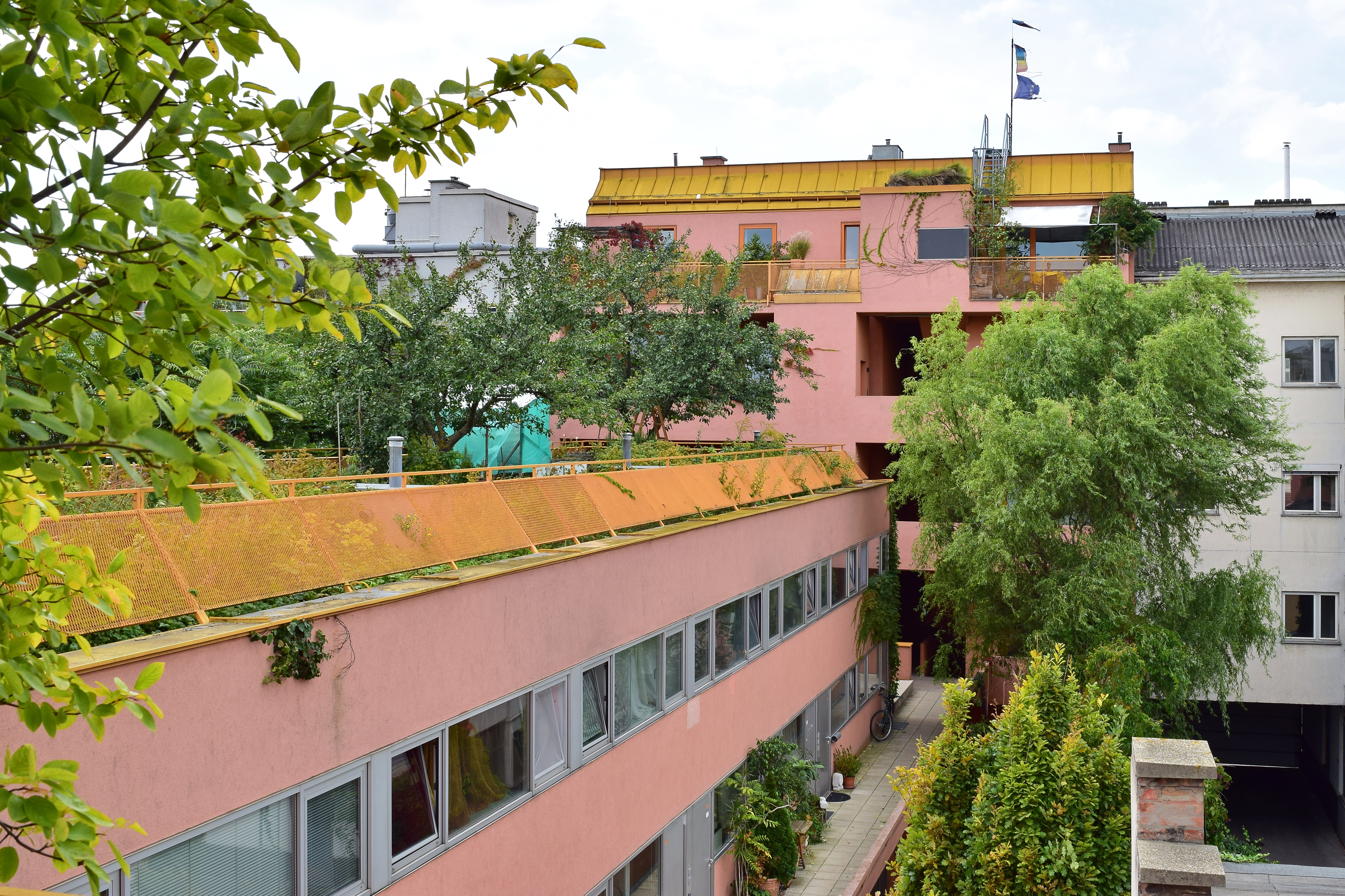 In der ehemaligen Sargfabrik in Wien-Penzing verwirklichte der Verein für Integrative Lebensgestaltung im Jahr 1996 ein Wohn- und Kulturprojekt. Darin befinden sich neben Wohnungen ein Kulturhaus, ein Badehaus, ein Seminarraum, ein Kinderhaus und ein Café-Restaurant. Näheres in diesem PDF.